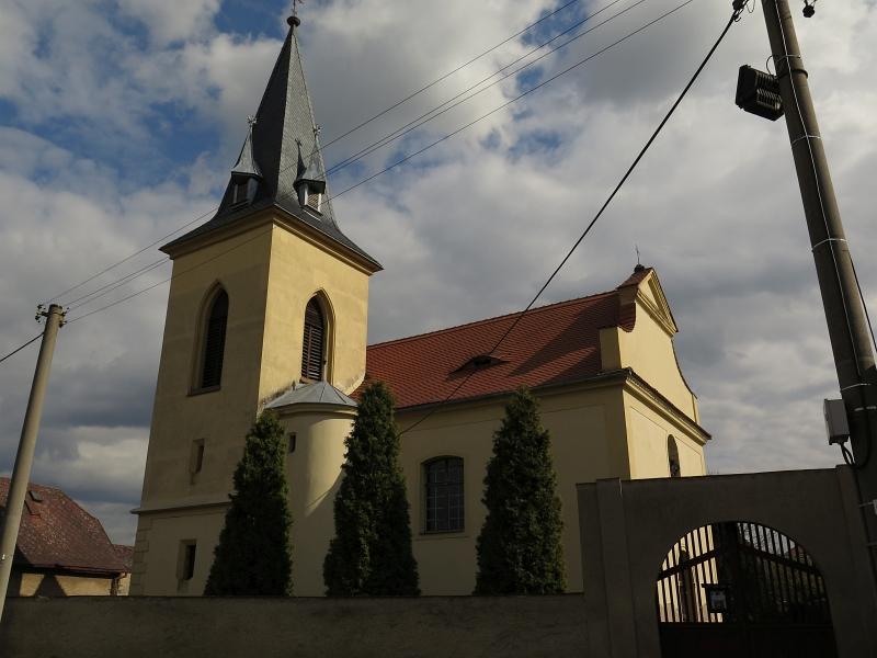 Kostel Nejsvětější Trojice, Sulejovice.